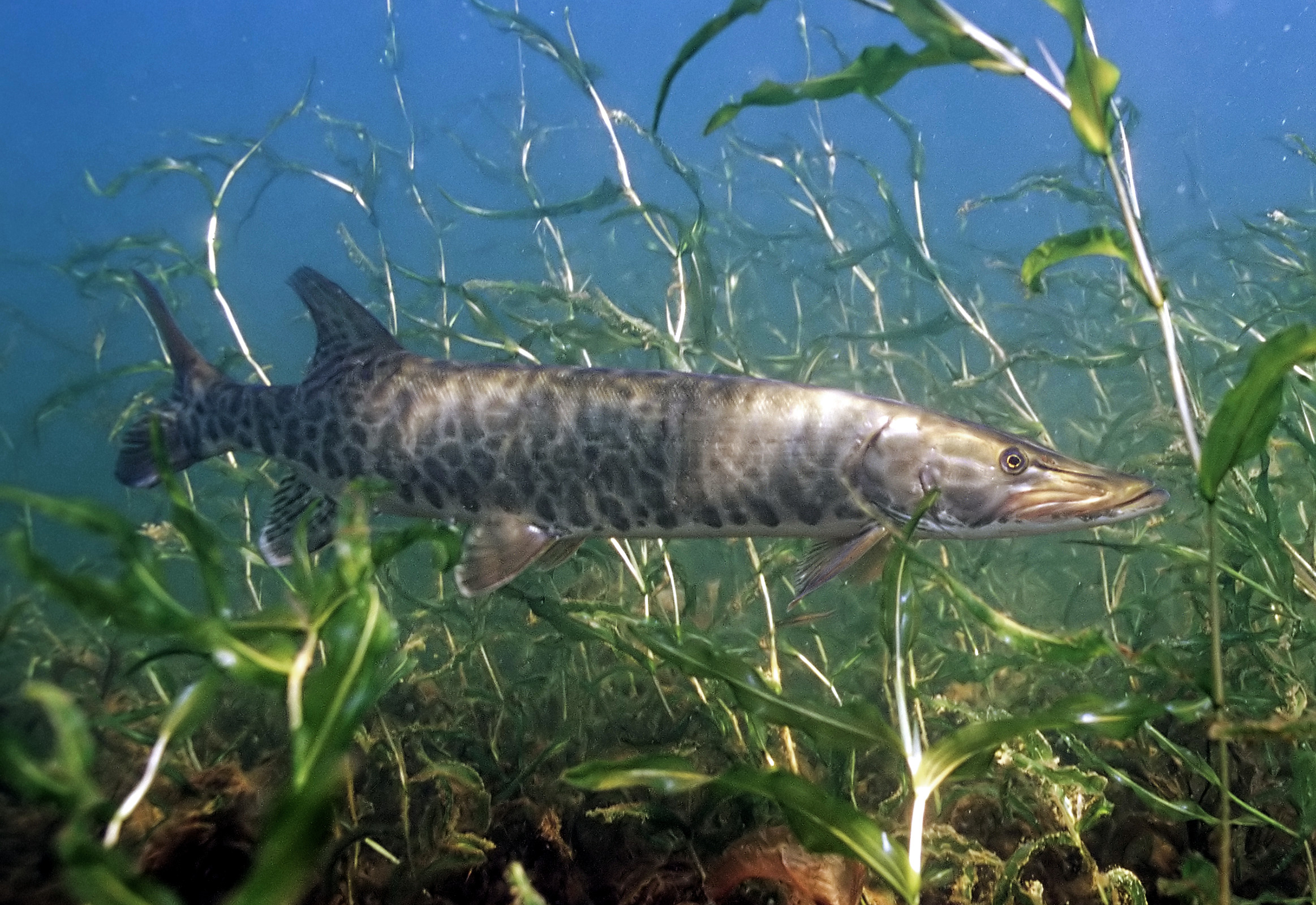 Muskellunge (Esox masquinongy)